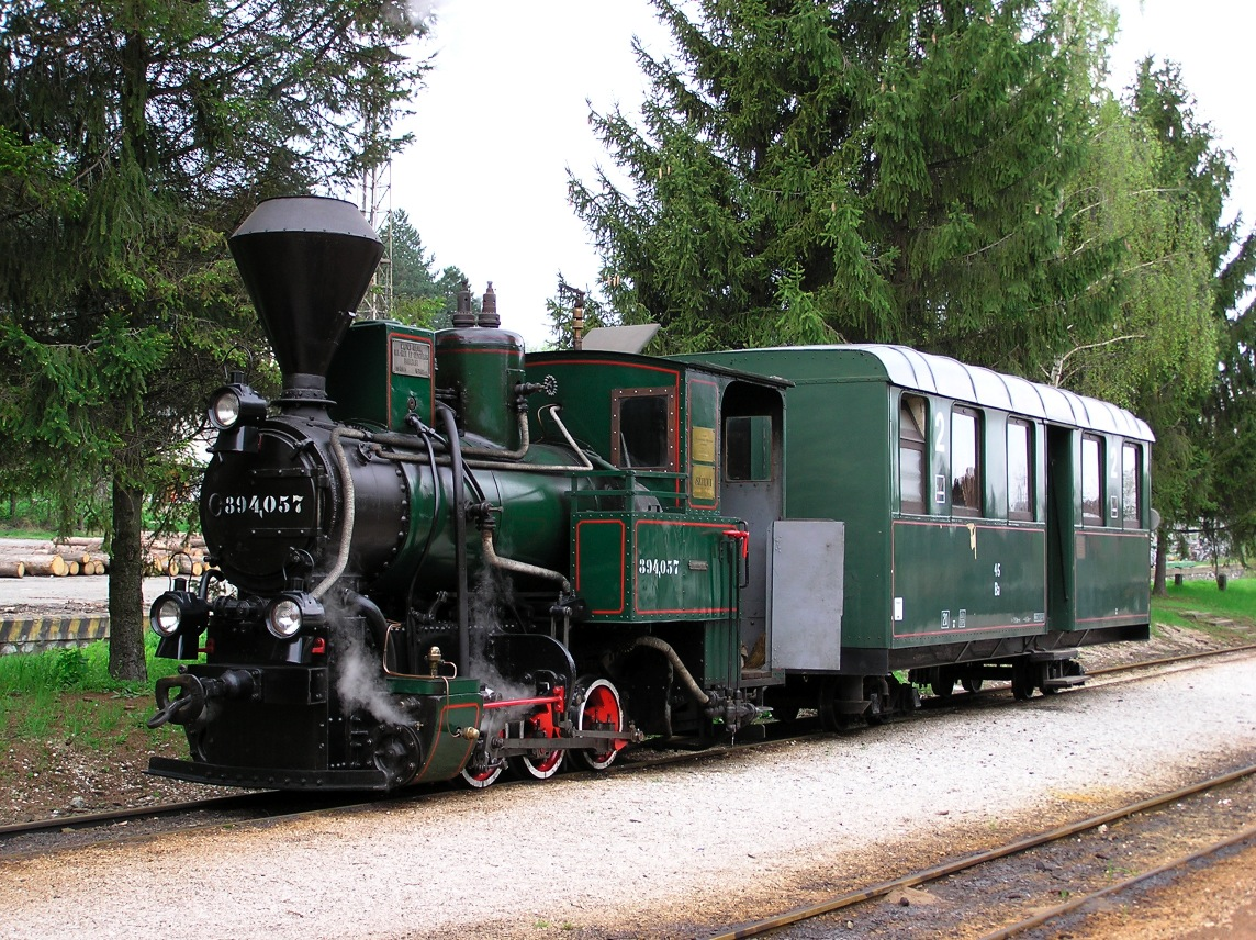 SZILVI, a Szilvásváradi Állami Erdei Vasút nosztalgia-gőzmozdonya.